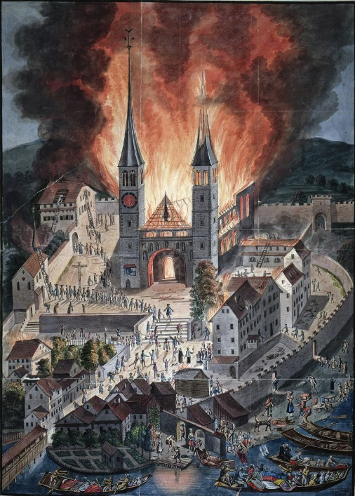 Brand der Hofkirche (Luzern) von 1633 Aquarell; Bild 665 x 473 mm; Erscheinungsdatum: ca. 1633